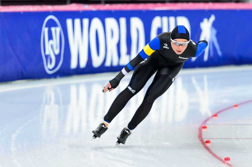 Speedskater